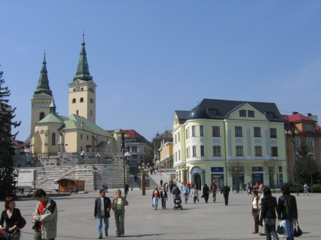 sk: Burianova veža, kostol Najsvätejšej Trojice a Farské schody, Žilina author: Juloml, apr. 2006